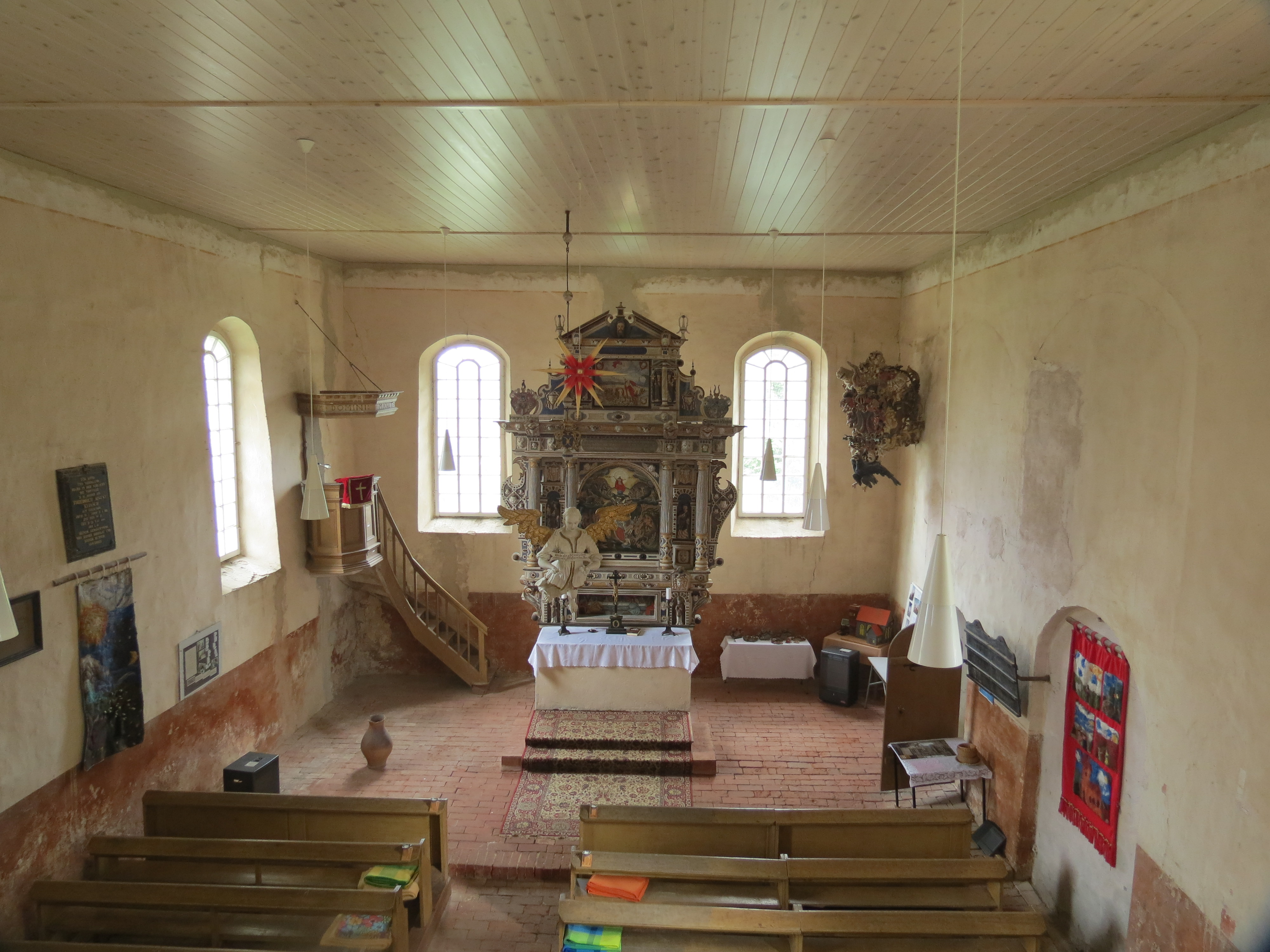 Dorfkirche Laubst, Ortsteil Laubst, Stadt Drebkau, Landkreis Spree-Neiße, Brandenburg, Innenraum, Blick nach Osten auf den Altar